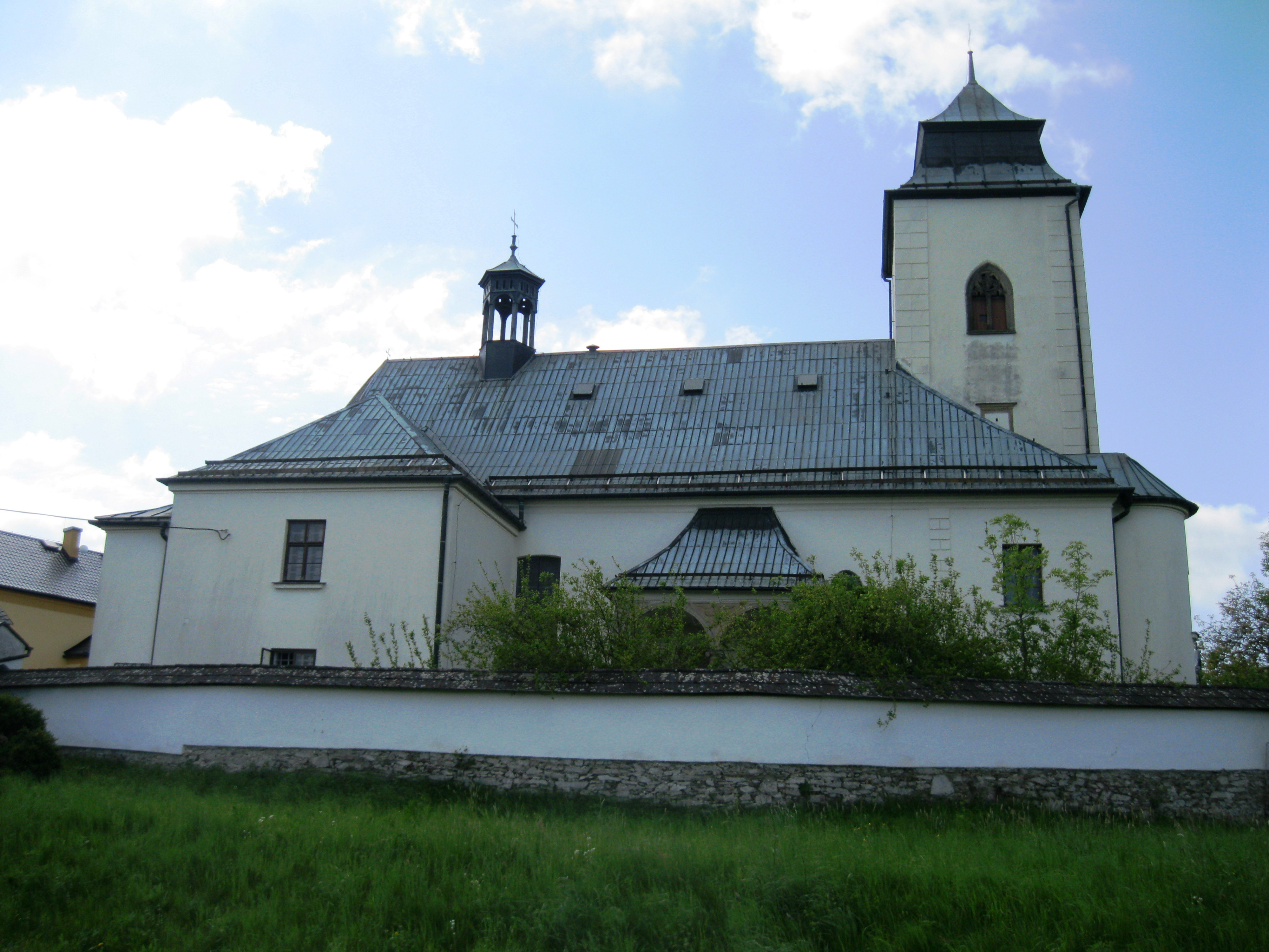 Kostel sv. Martina (Měrotín), na západním okraji obce, Měrotín